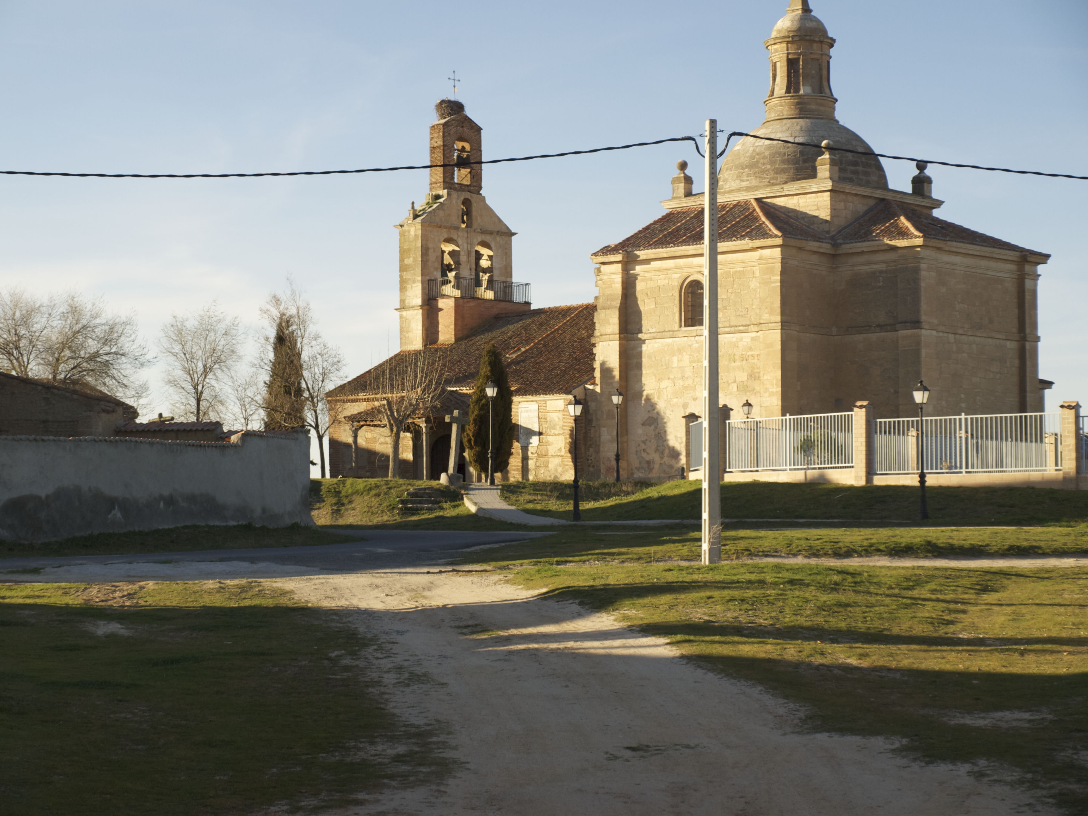 Vista de la Iglesia de Cobos de Segovia desde la Calle de las Cruces.